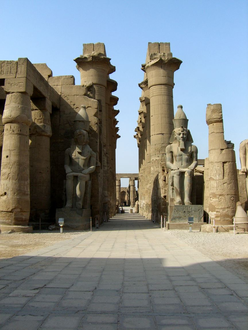 Vue de la première cour du temple de Louxor avec les colosses de Ramsès II et en second plan la grande colonnade - Nouvel Empire